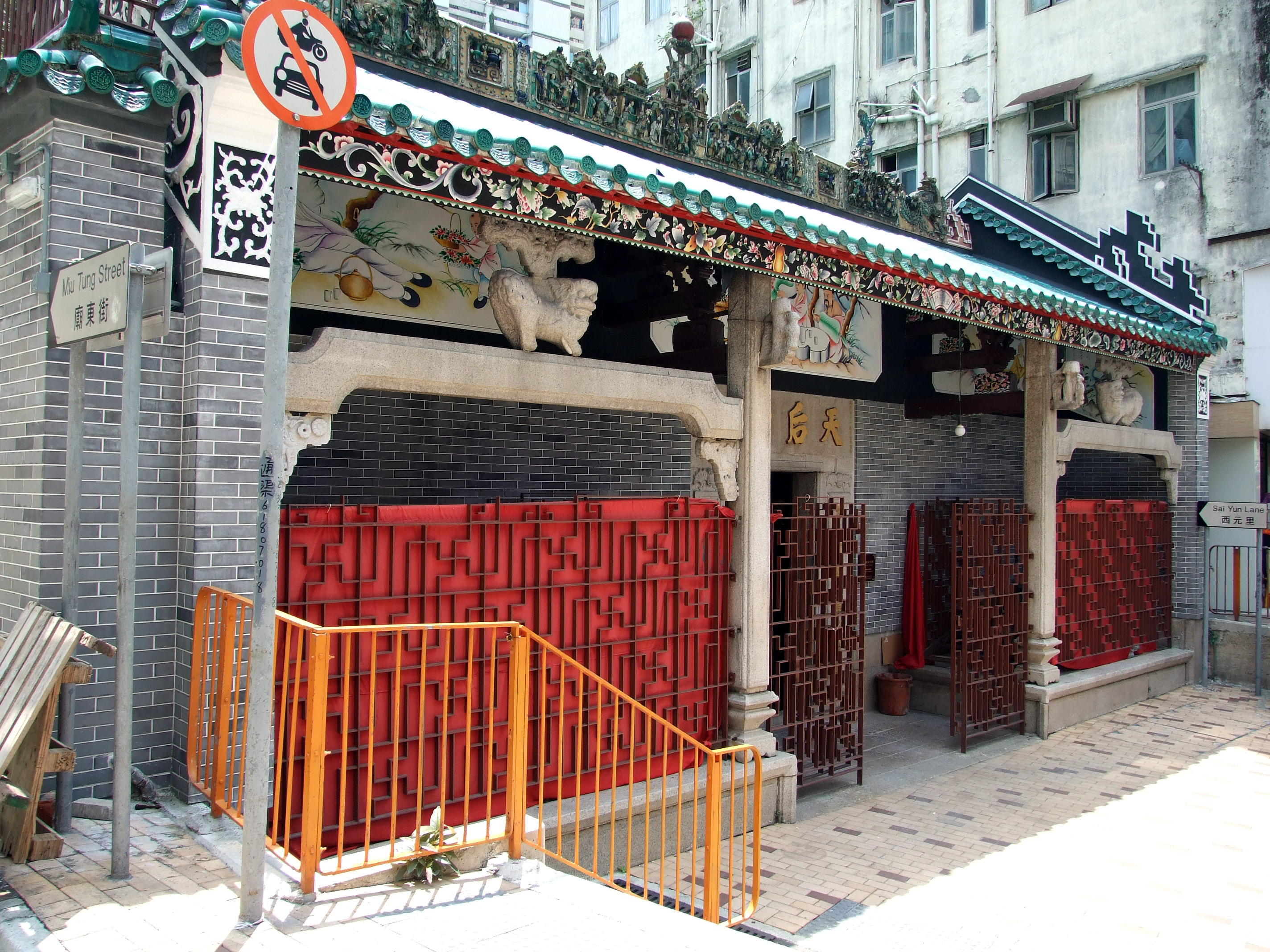 中文（香港）: 筲箕灣天后古廟